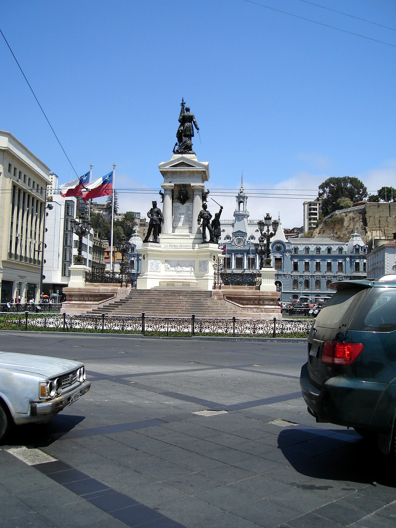 Monumento a los héroes de Iquique ubicado en la plaza Sotomayor del puerto de Valparaíso, Chile